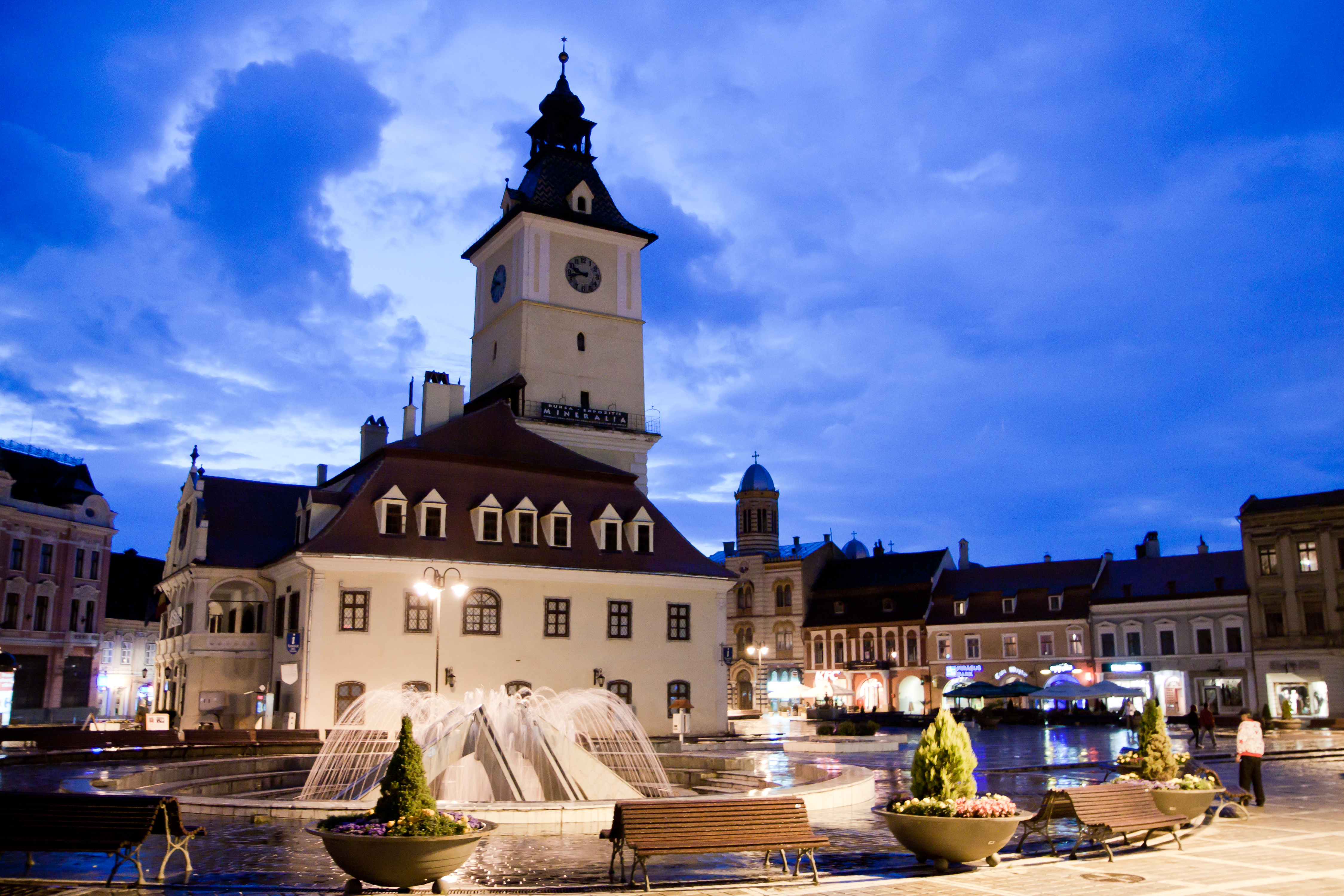 Brasov, Piata Sfatului